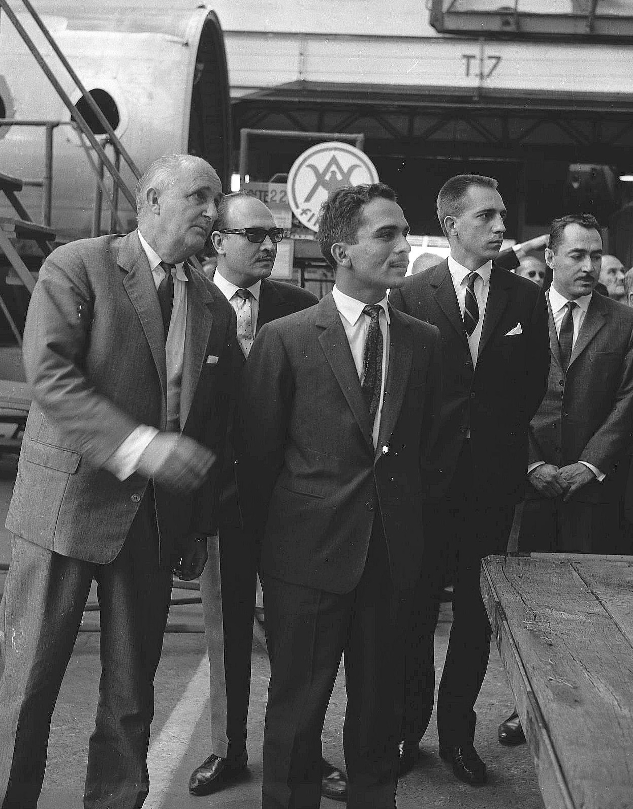 Sud Aviation. Le 16 Septembre 1963. Vue du roi de Jordanie en visite dans les ateliers de Sud Aviation.